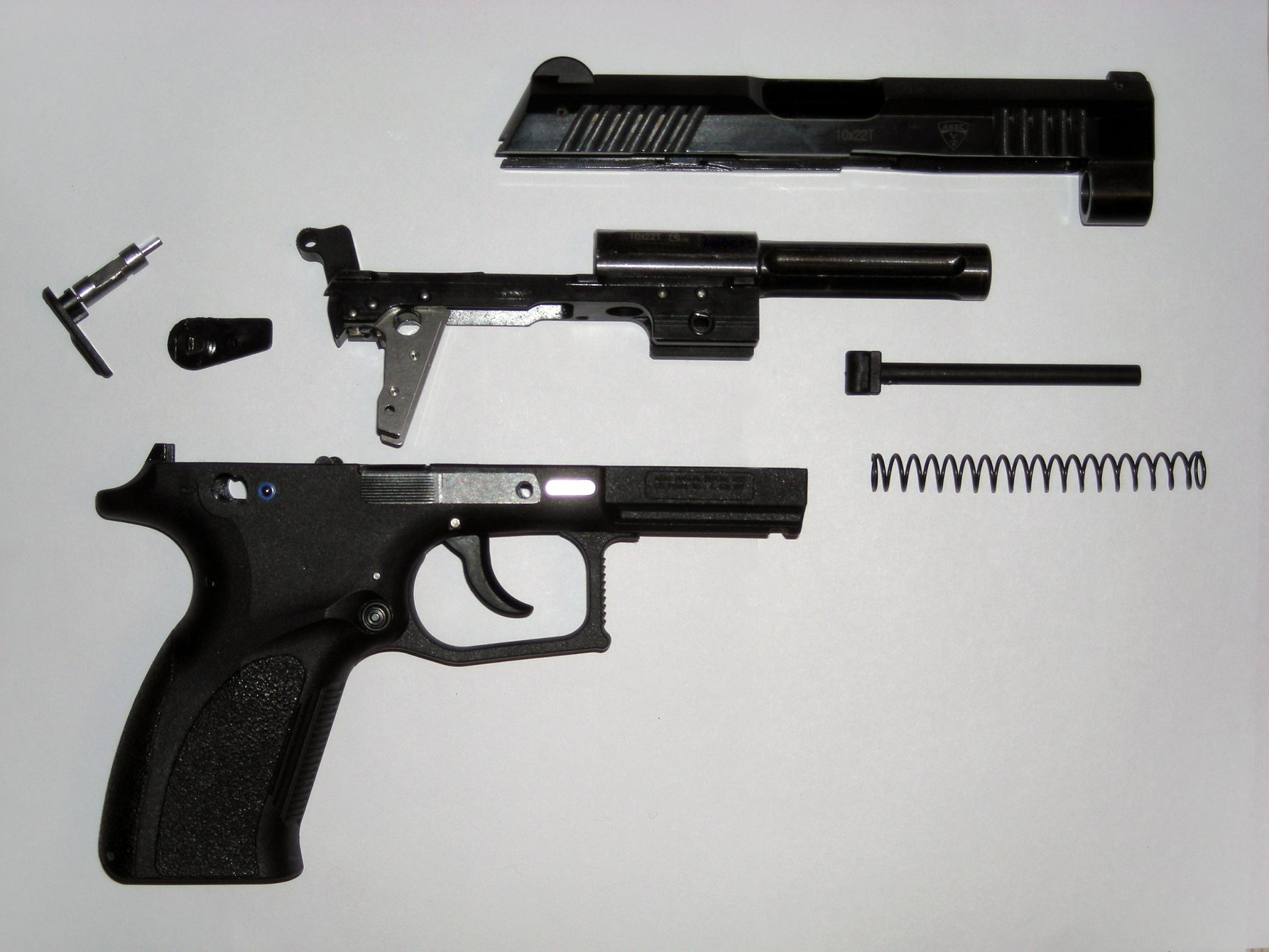 Разборка: Traumatic pistol - Grand Power T10